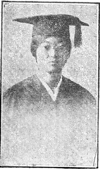 이화전문과 박마리아양